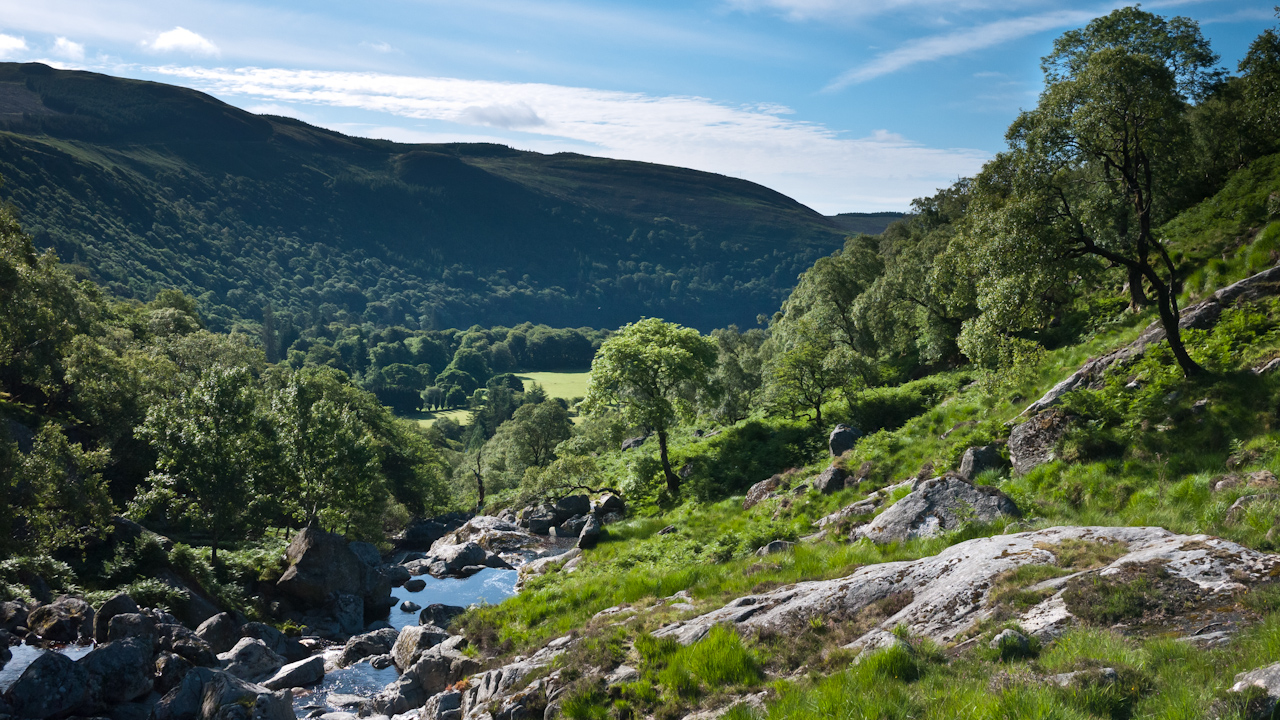 Cloghoge River